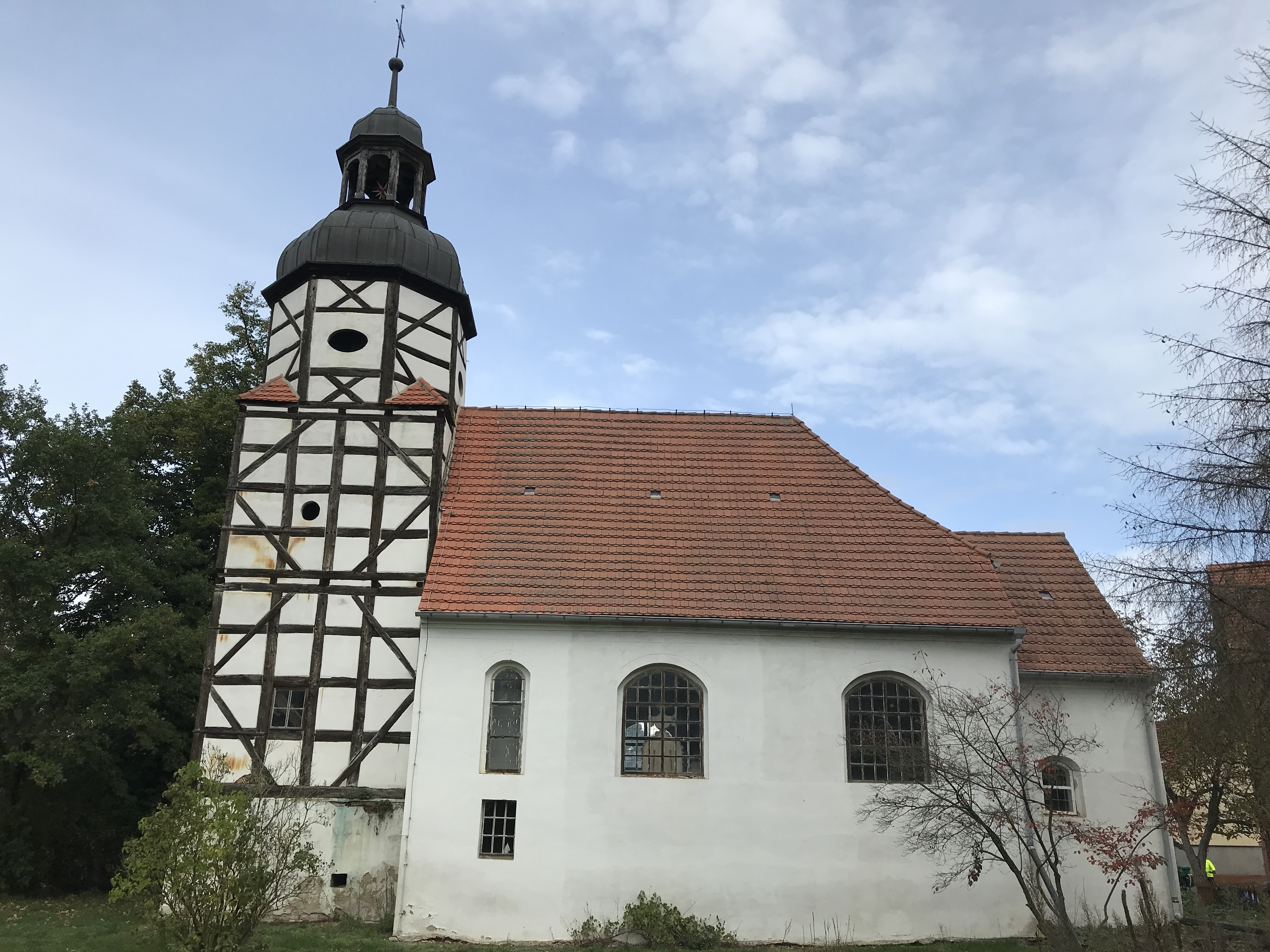 Die Dorfkirche Mehlsdorf in der Gemeinde Ihlow im Landkreis Teltow-Fläming ist ein Putzbau aus dem 16. Jahrhundert. Im Innern steht unter anderem ein Kanzelaltar aus der zweiten Hälfte des 17. Jahrhunderts.